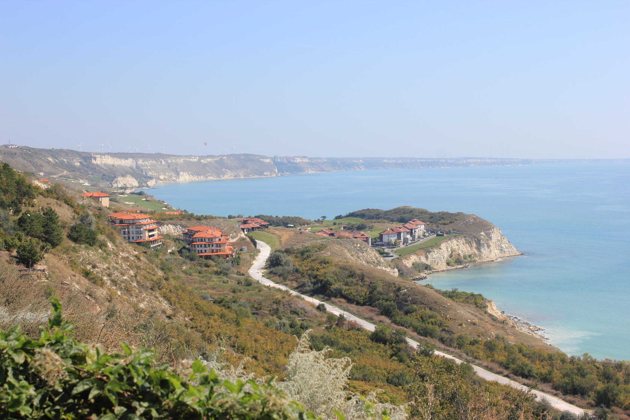 Schwarzmeerküste bei Baltschik, Bulgarien.